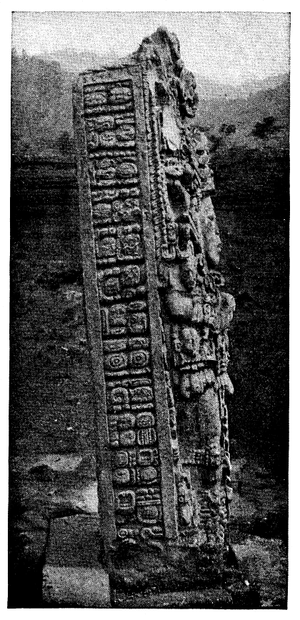 Stela A